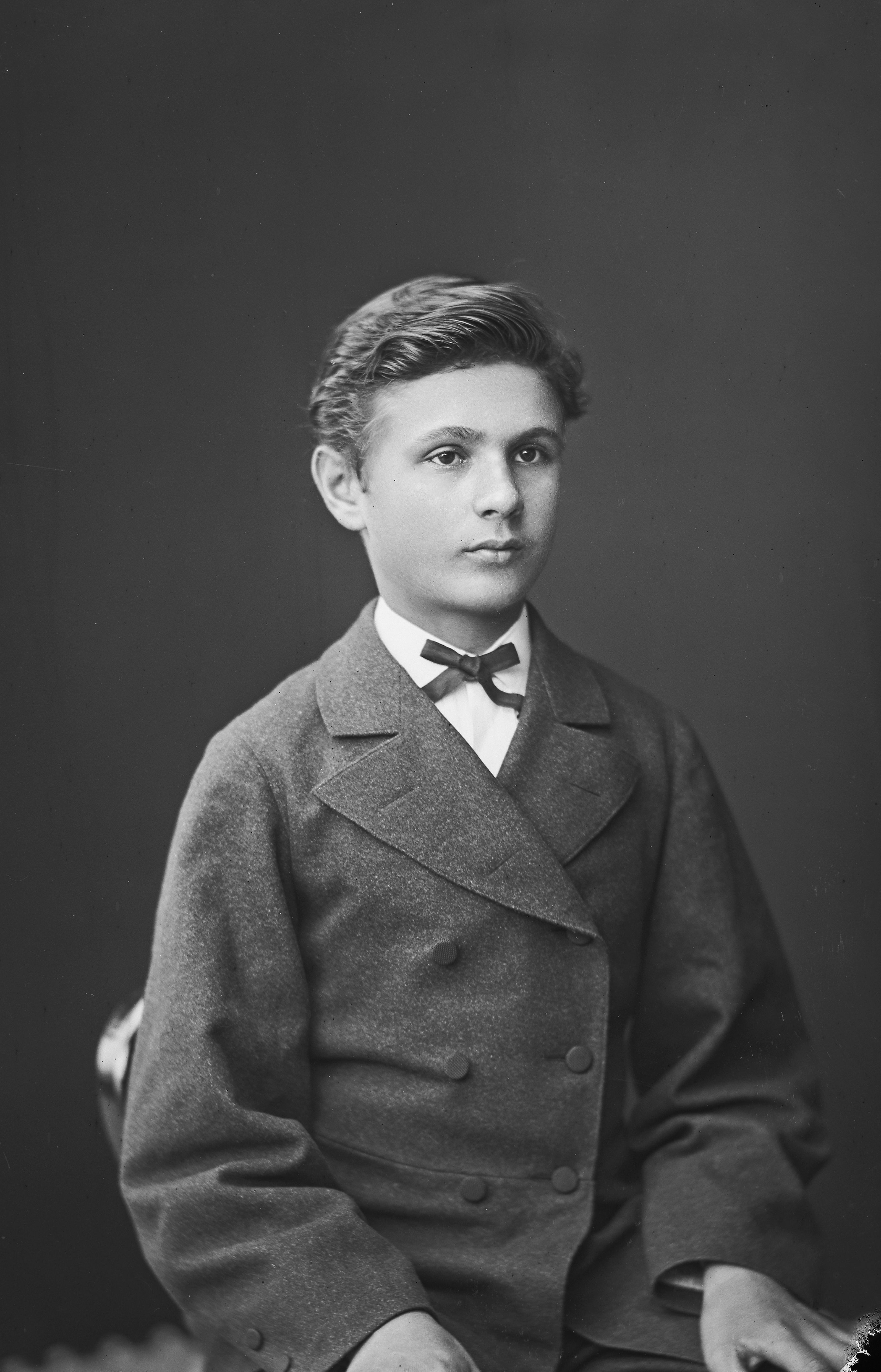 Matti Kurikka 16.9.1877